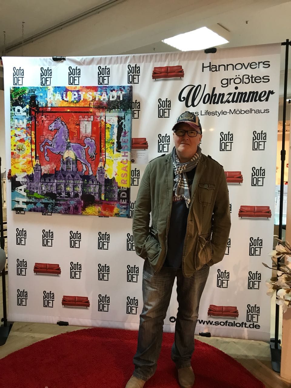 Mühlbauer-Gardemin mit einem Kunstwerk auf "Hannover Art Show"